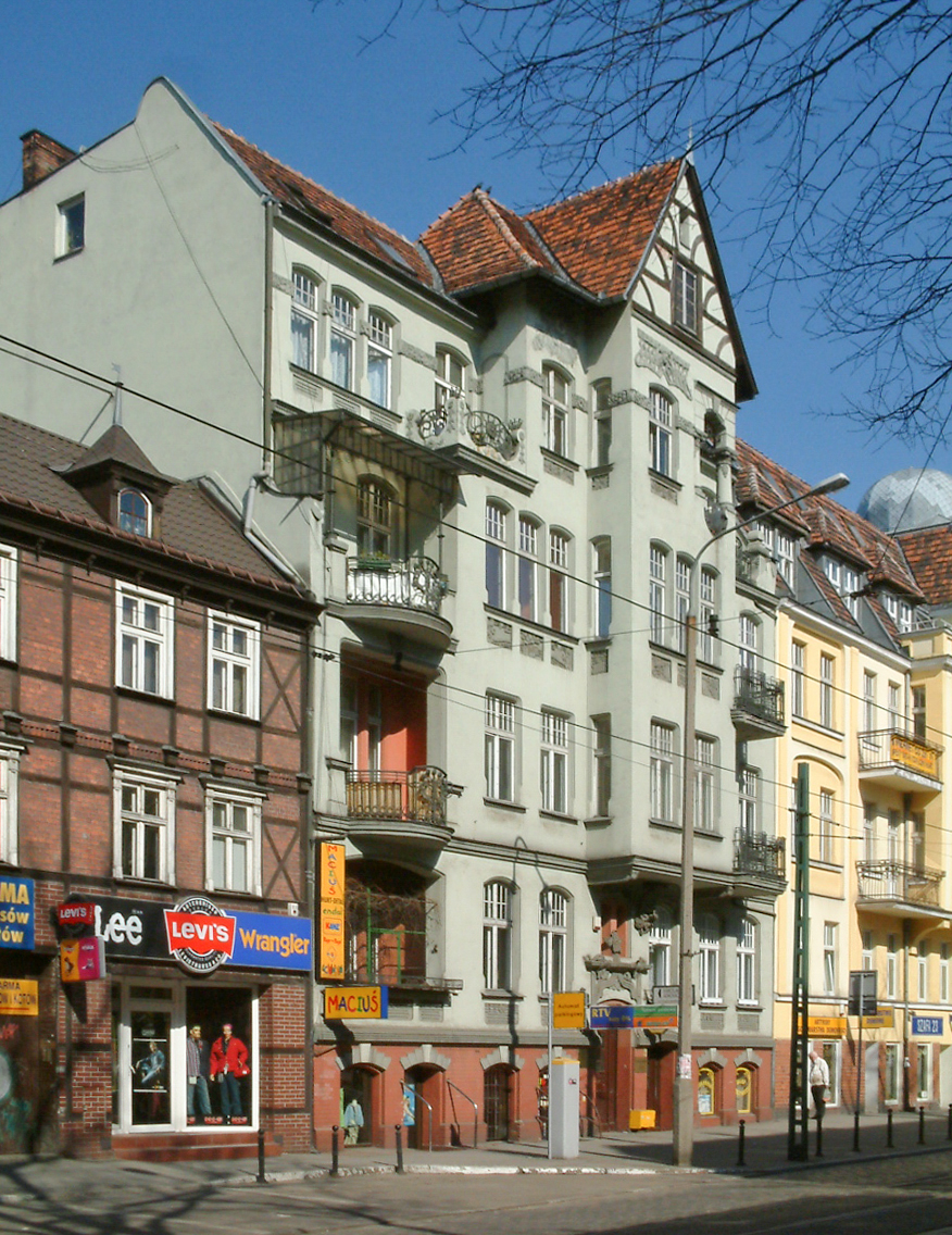 Poznań Jeżyce, ul. Dąbrowskiego 25 - kamienica Marcina Kasprowicza (zabytek nr A 337)